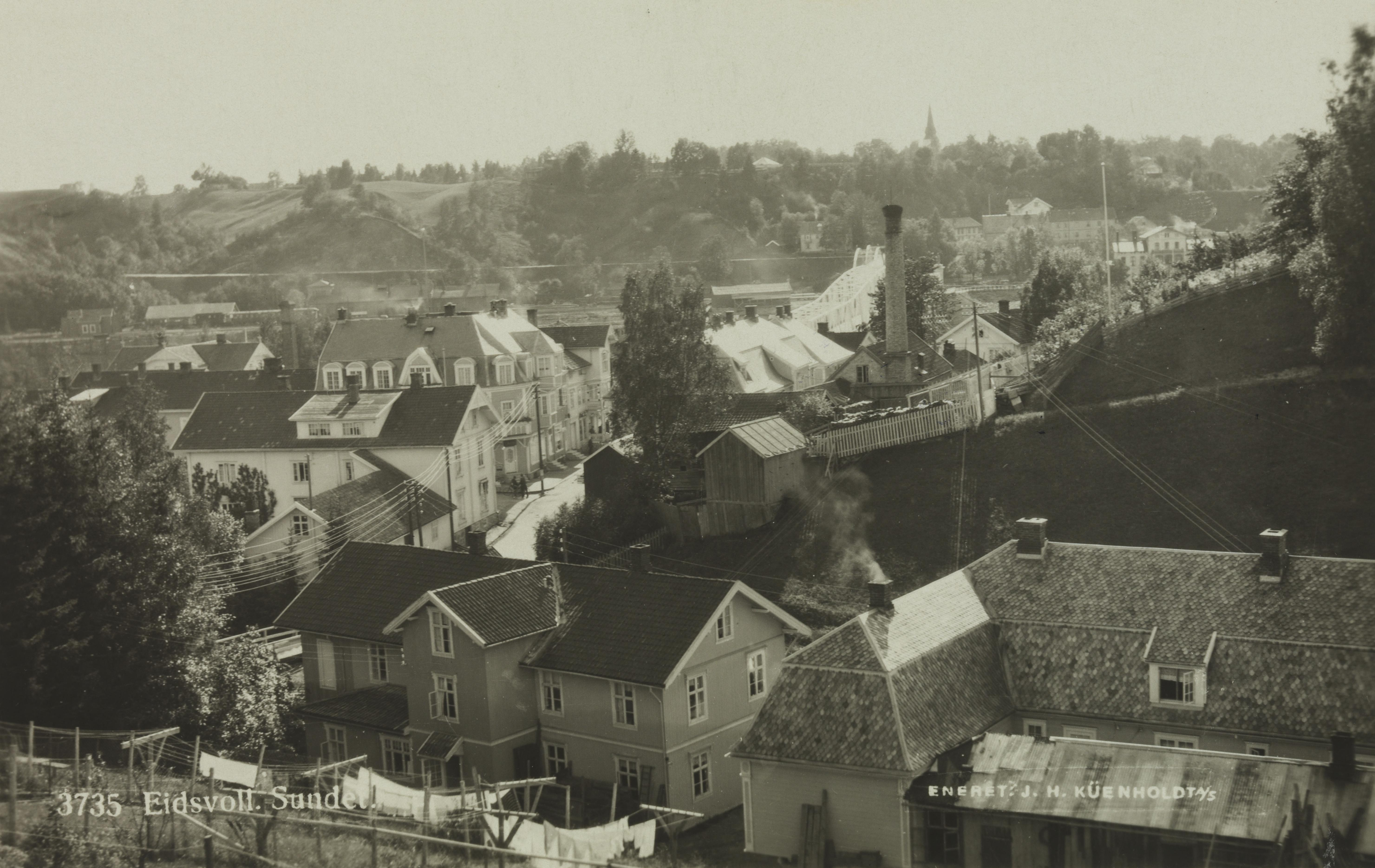 Bildet er hentet fra Nasjonalbibliotekets bildesamling Eidsvoll, Eidsvoll, Akershus